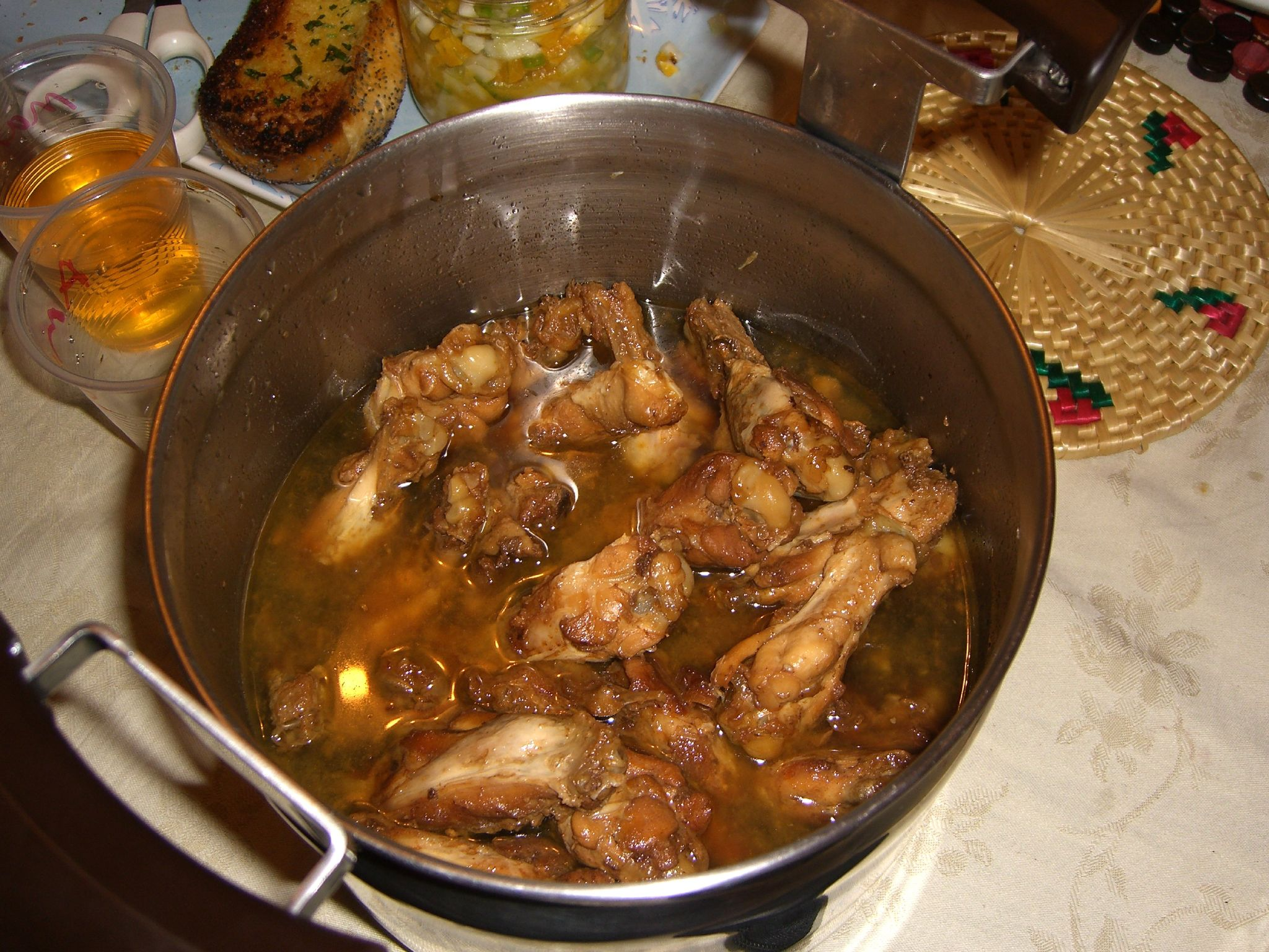 Eliza's Swiss Chicken Wings